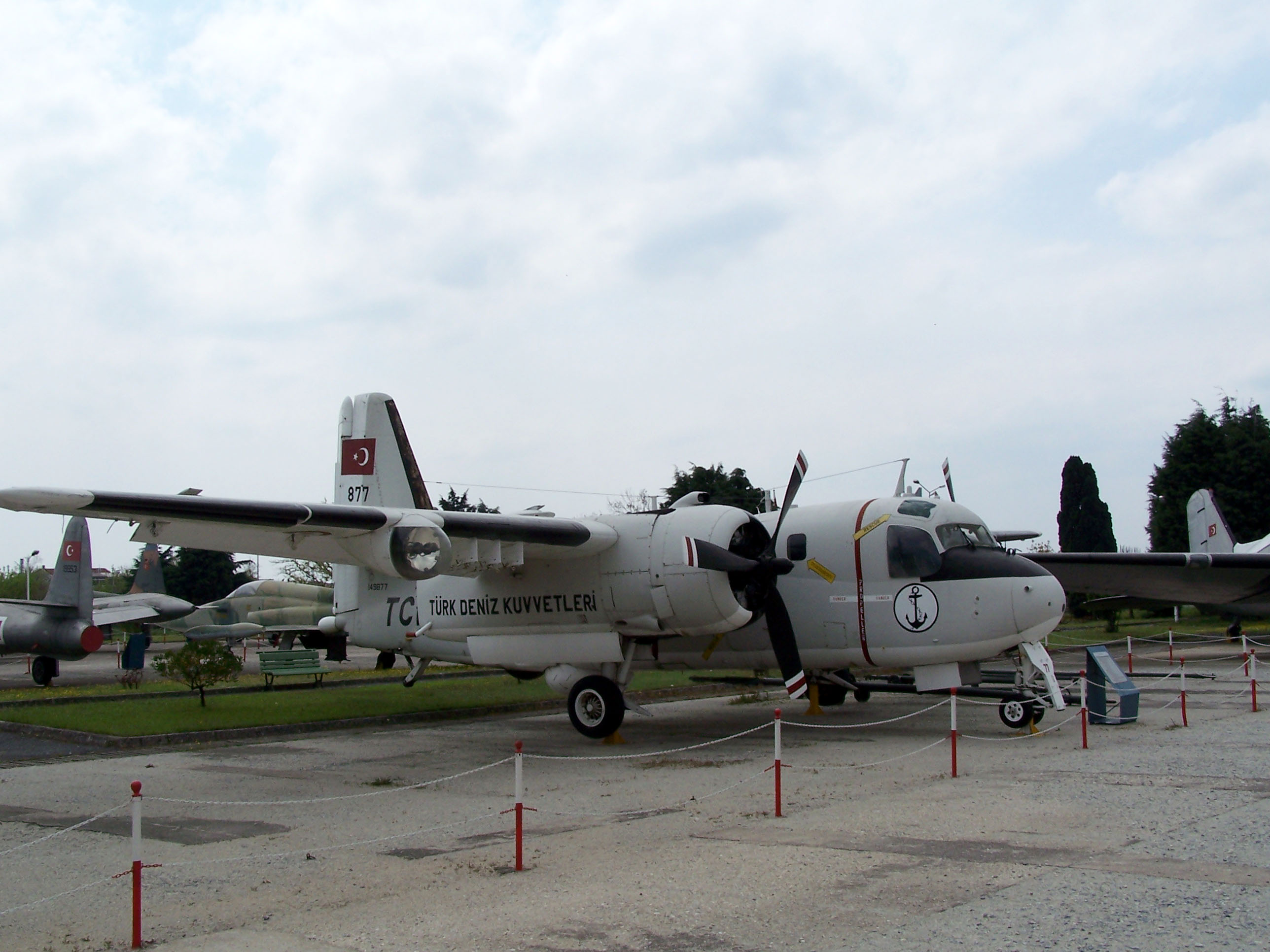 S-2E Tracker in Istanbul Aviation Museum (İstanbul Havacılık Müzesi)